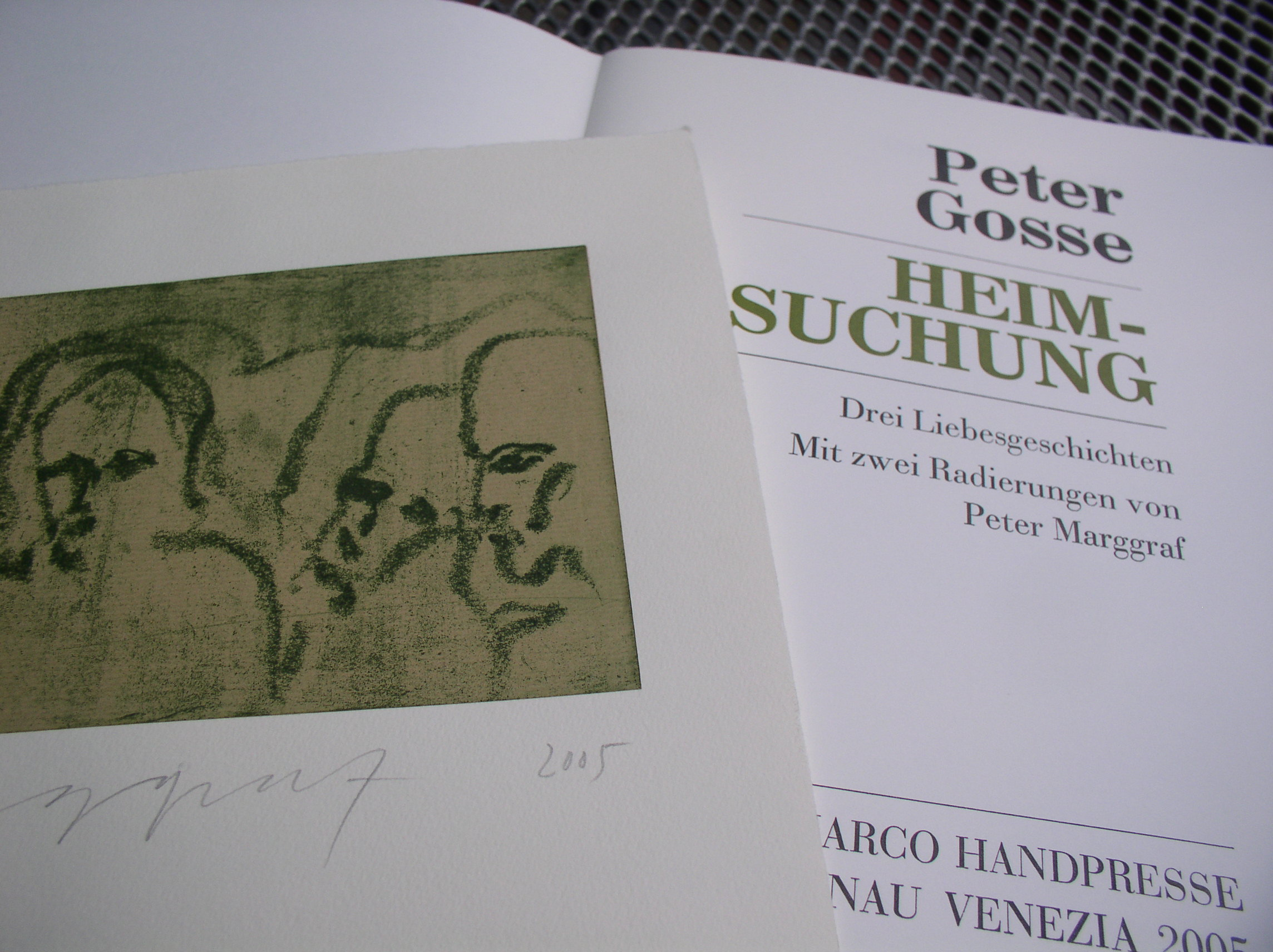 Heimsuchung. Peter Gosse Liebesgeschichten mit zwei Radierungen von Peter Marggraf. Dieses Buch wurde im Winter 2005 im Bleisatz auf einer Linotype aus der Bodoni, 12 Punkt, gesetzt und auf einer Handpresse gedruckt.